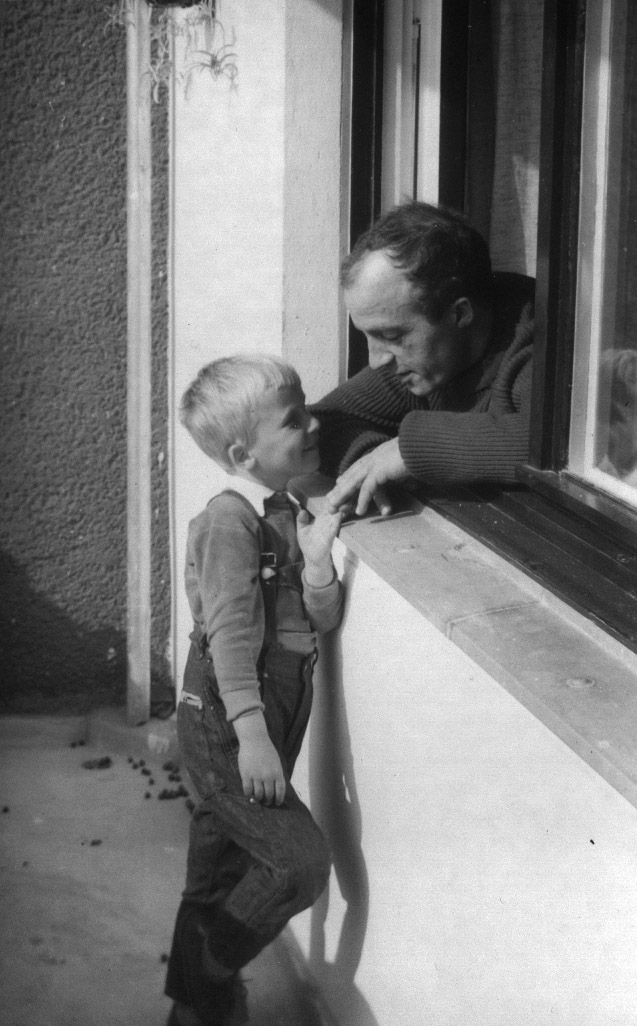 W.-D. Marsch - mal ganz privat